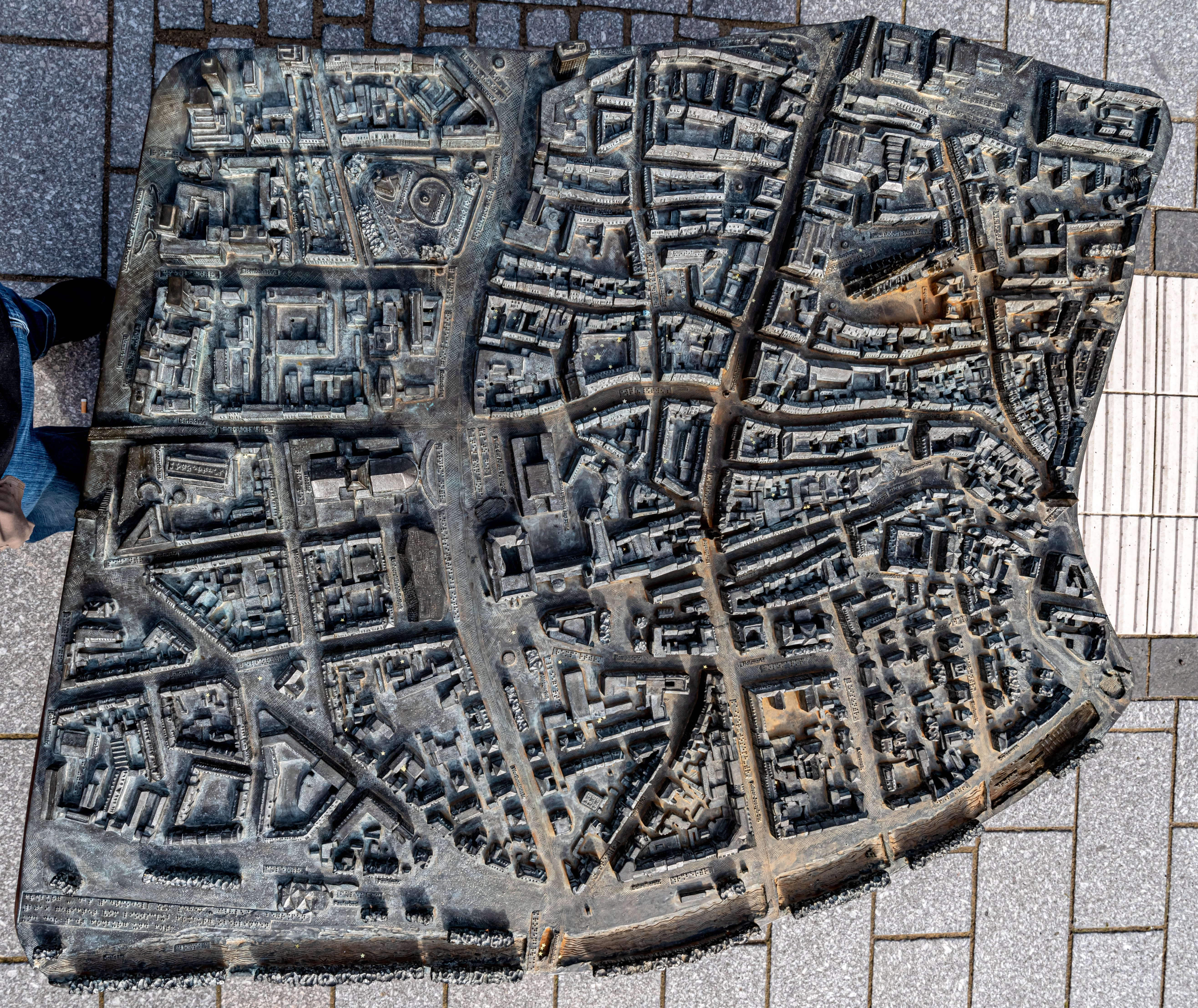 Stadtmodell von Freiburg zum Sehen-Fühlen-Begreifen Rotteckting Ecke Eisenbahnstraße Gestiftet vom Lions Club Freiburg - Oberlinden Eingeweiht am 24. Oktober 2019 Bronzemodell zeigt Freiburgs Innenstadt aus der Vogelperspektive Künstler fertigt ein Blinden-Tastmodell für die Innenstad